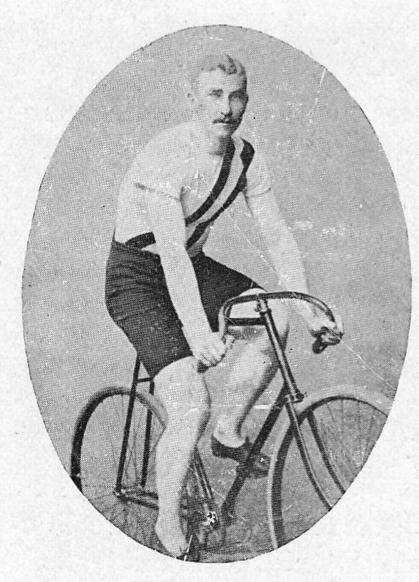 Jaap Eden, niederländischer Radrennfahrer und Eisschnellläufer, ca. 1895